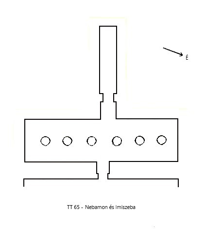 Nebamon és Imiszeba sírjának alaprajza